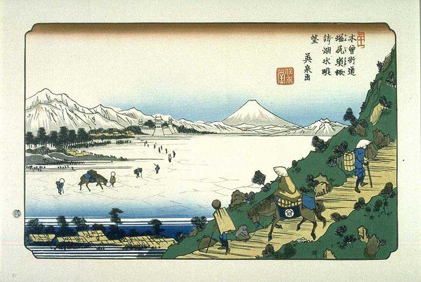 Shiojiri on the Kisokaido, ukiyo-e prints by Keisai Eisen